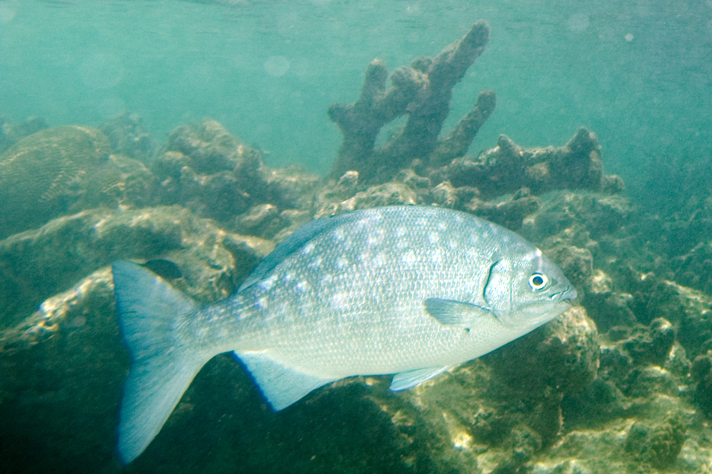 Kyphosus sp.